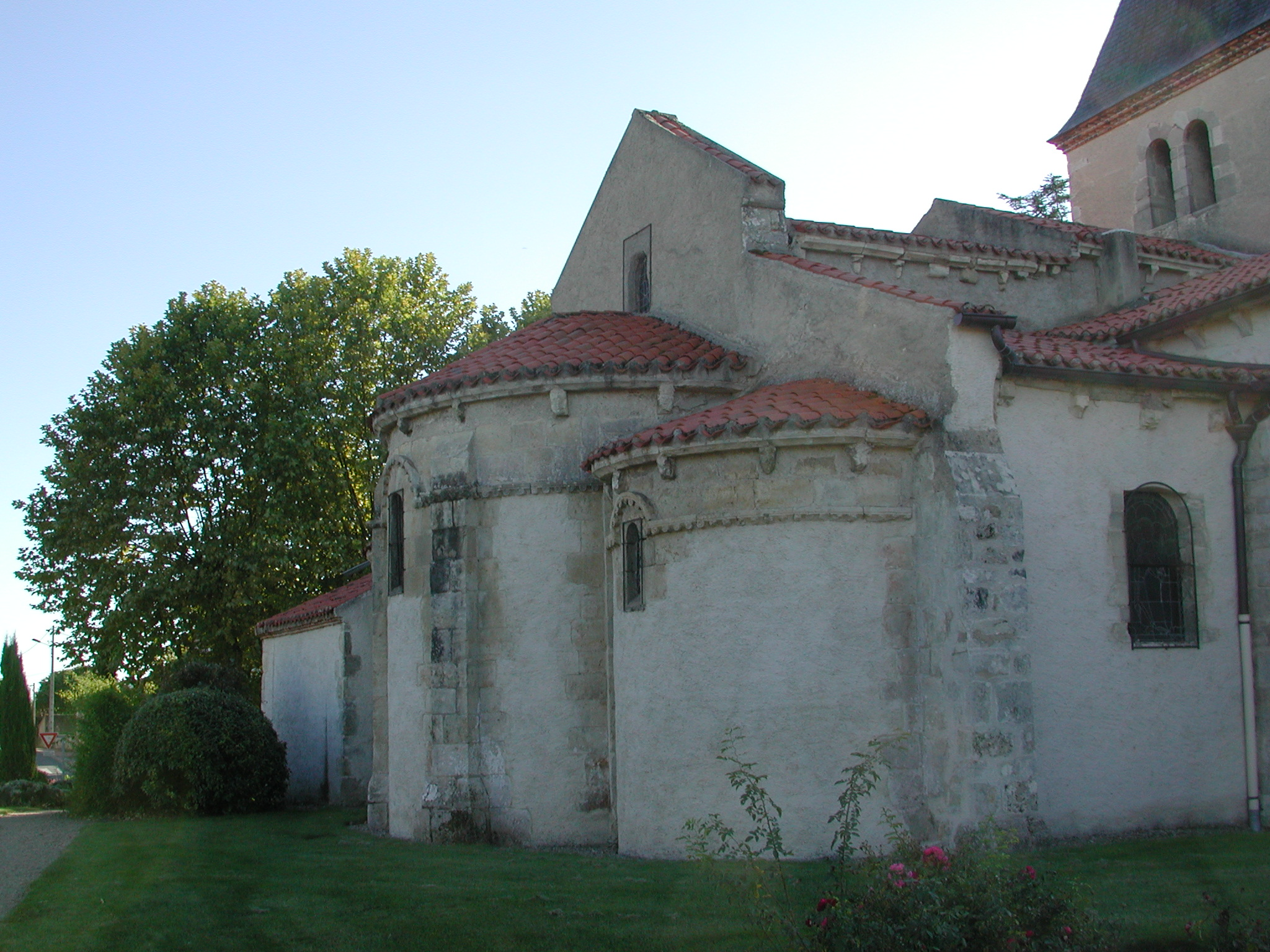 Église romane de Saint-Pont (Allier, France). Chevet (partie est de l'église).